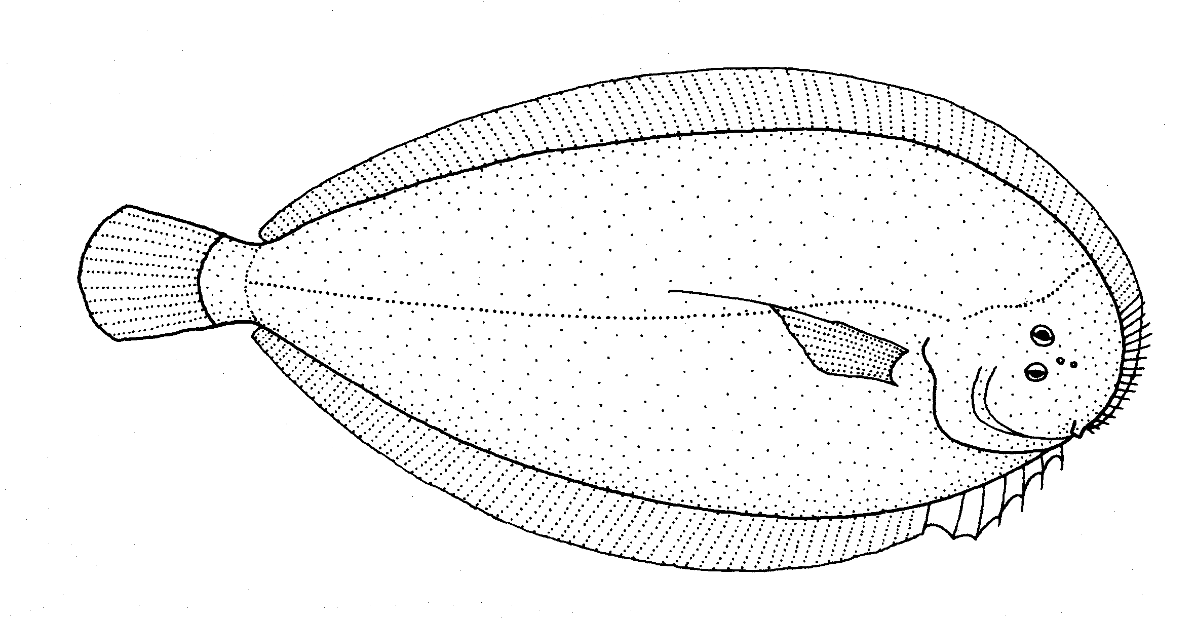 Peltorhamphus novaezeelandiae (New Zealand sole)